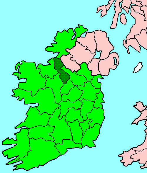 Leitrim